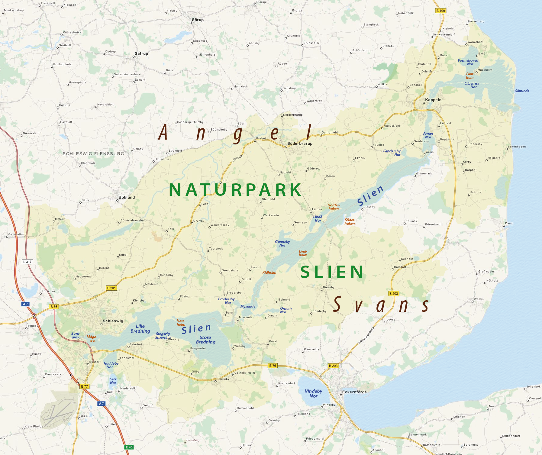 Karte des Naturparks Schlei